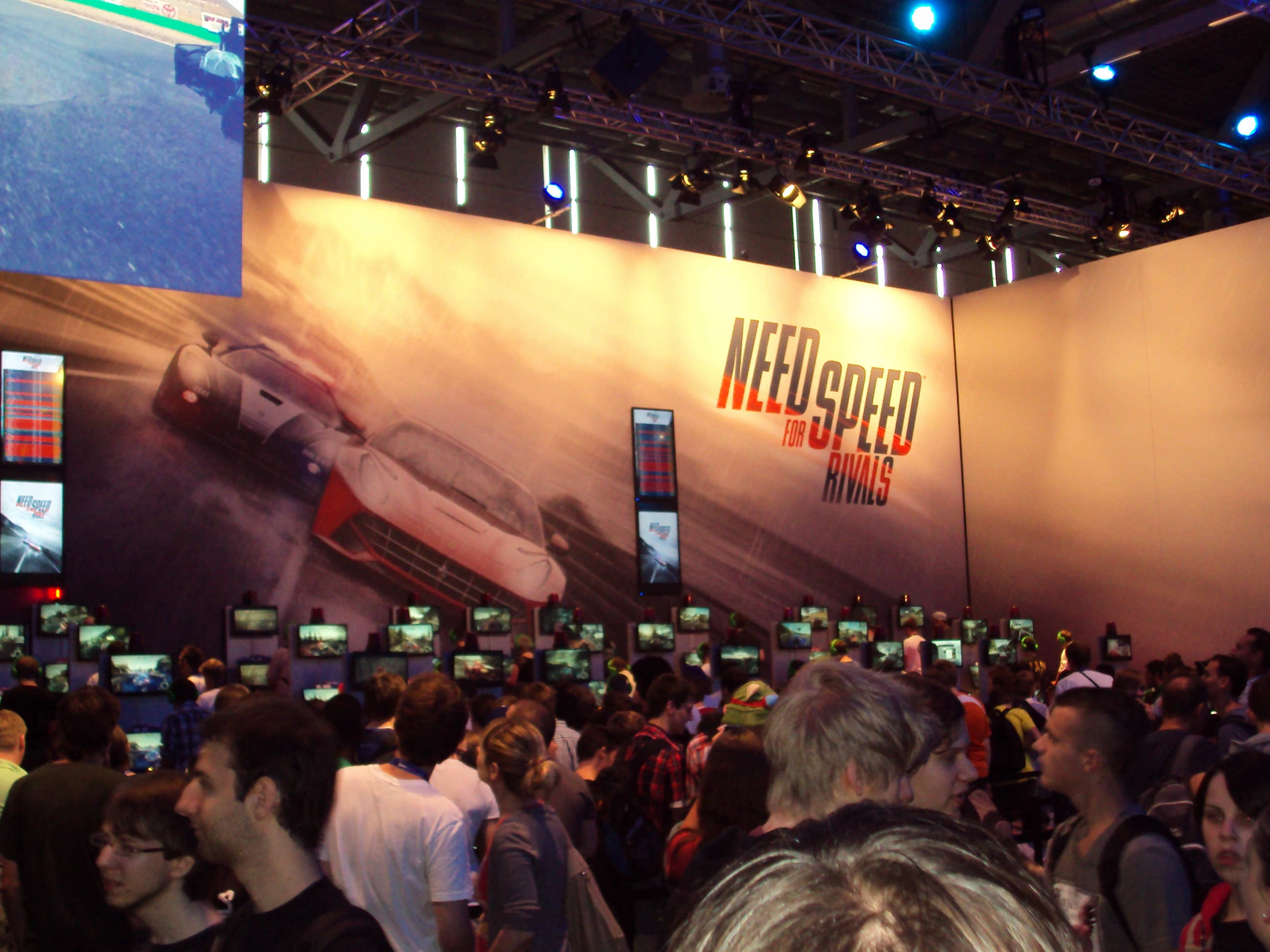 Stand van Need for Speed op Gamescom 2013